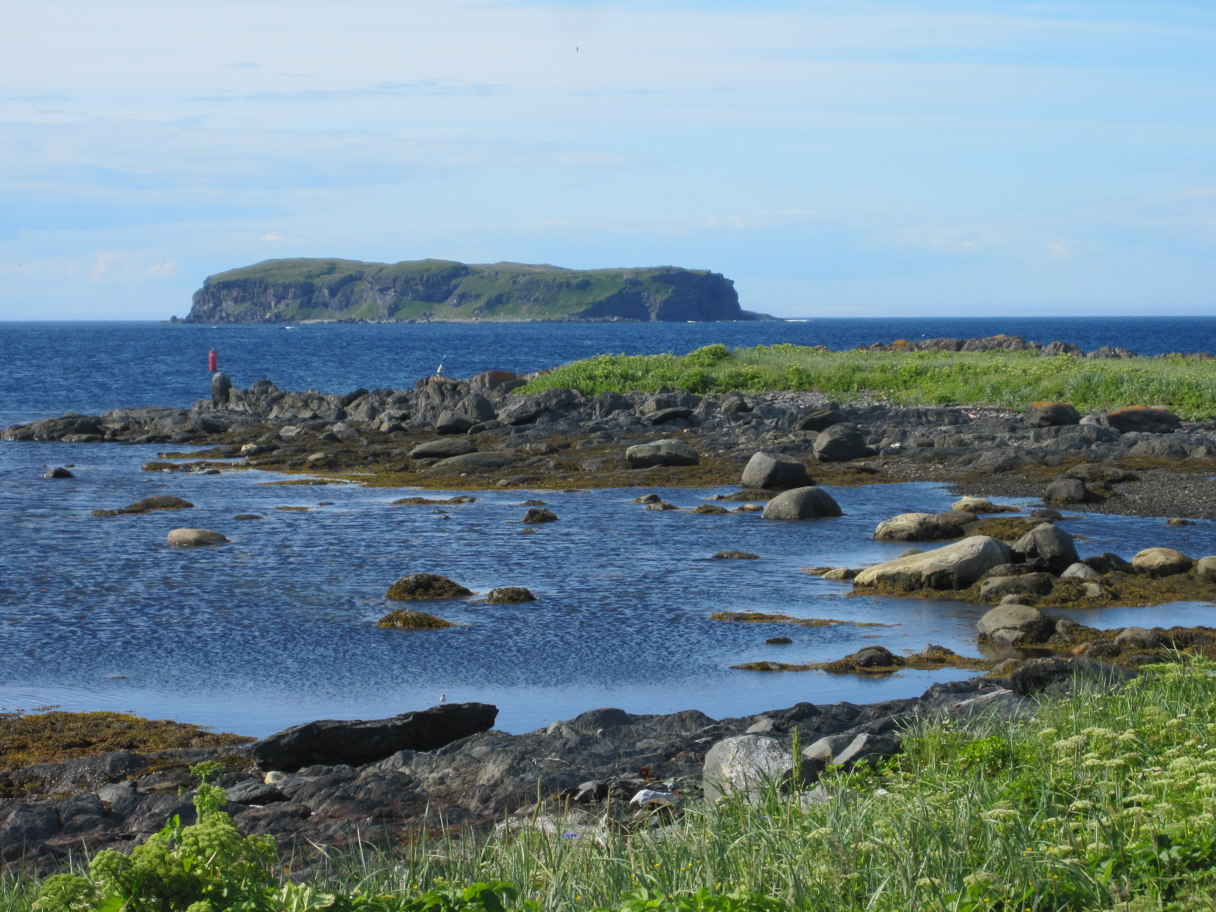 L'Anse Aux Meadows